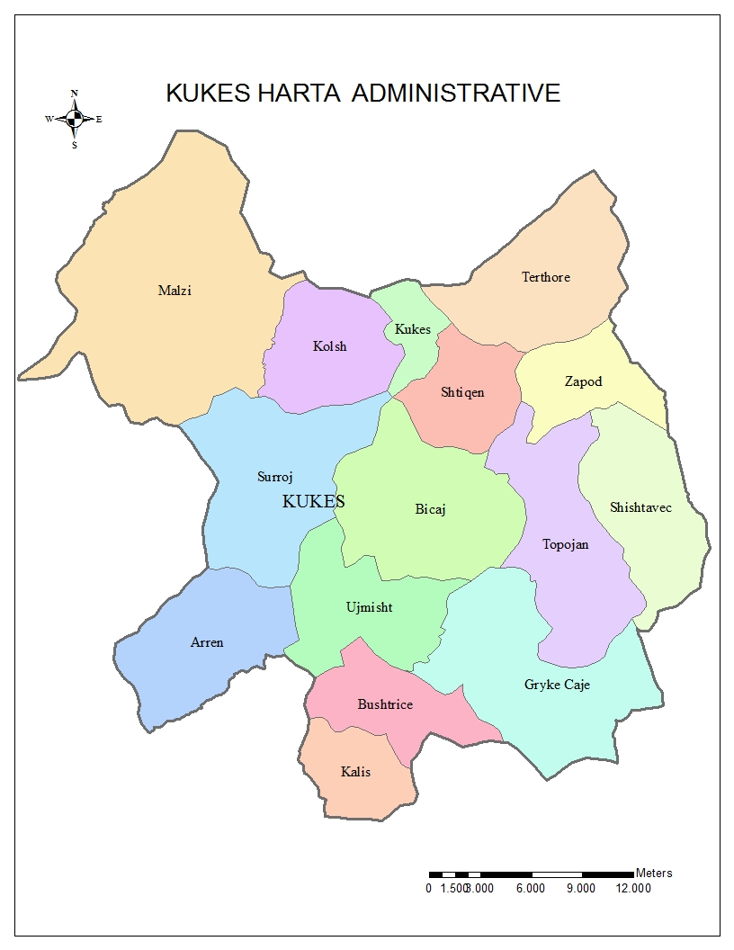 Harta e Kukesit